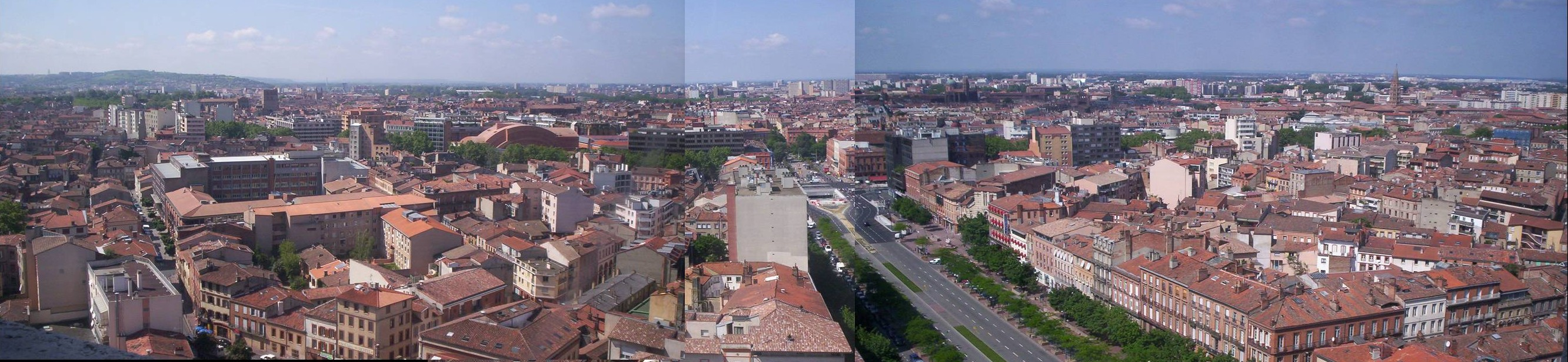 Panorama de Toulouse, montage avec 3 photos